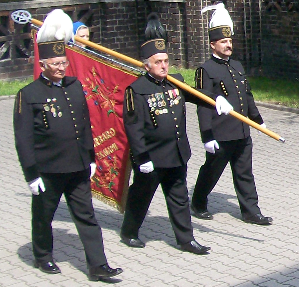 Poczet sztandarowy parafii św. Anny w Janowie w mundurach górniczych